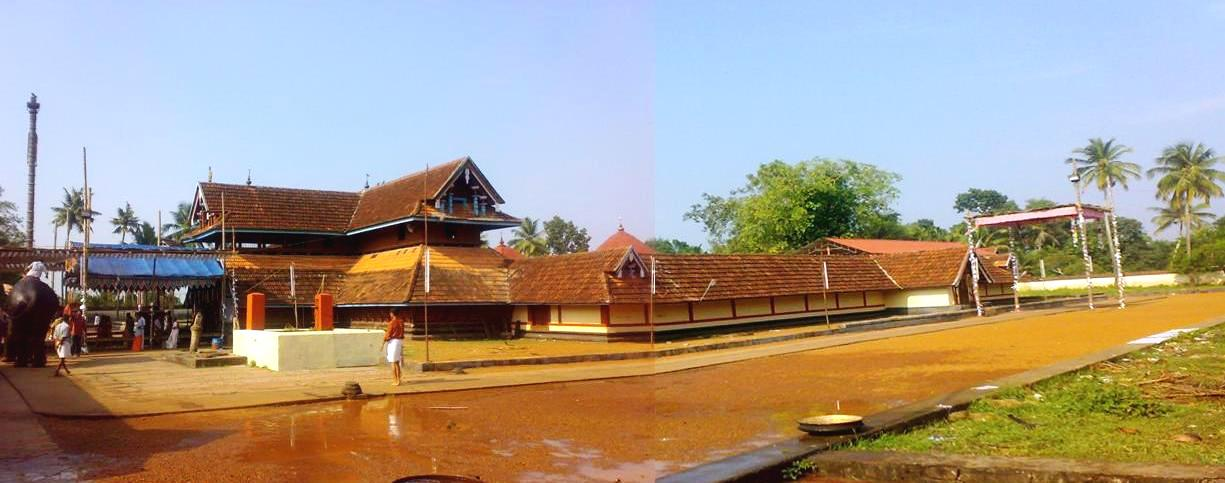 വാഴപ്പള്ളി മഹാക്ഷേത്രം വിഗഹ വീക്ഷണം